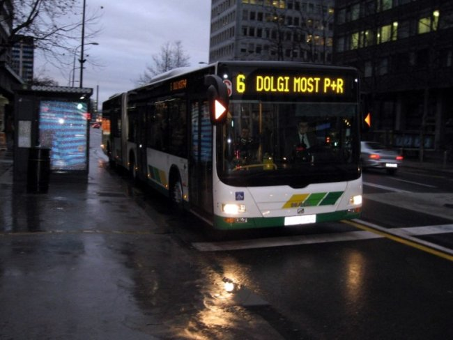 Avtobus na Bavarskem dvoru